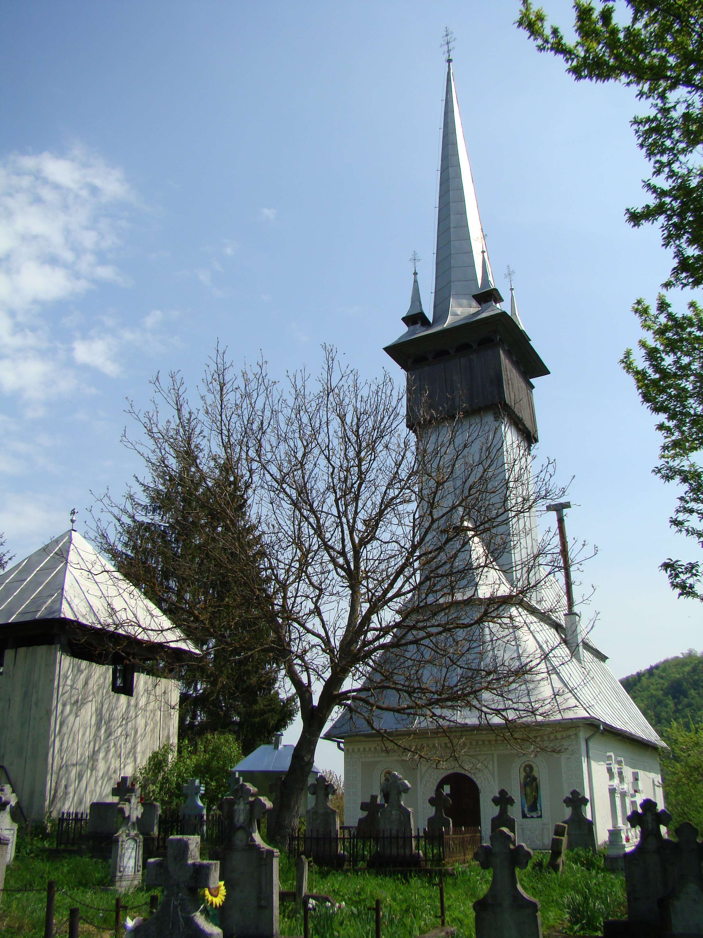 Biserica „Nașterea Maicii Domnului” Vălenii Lăpușului, Maramureș